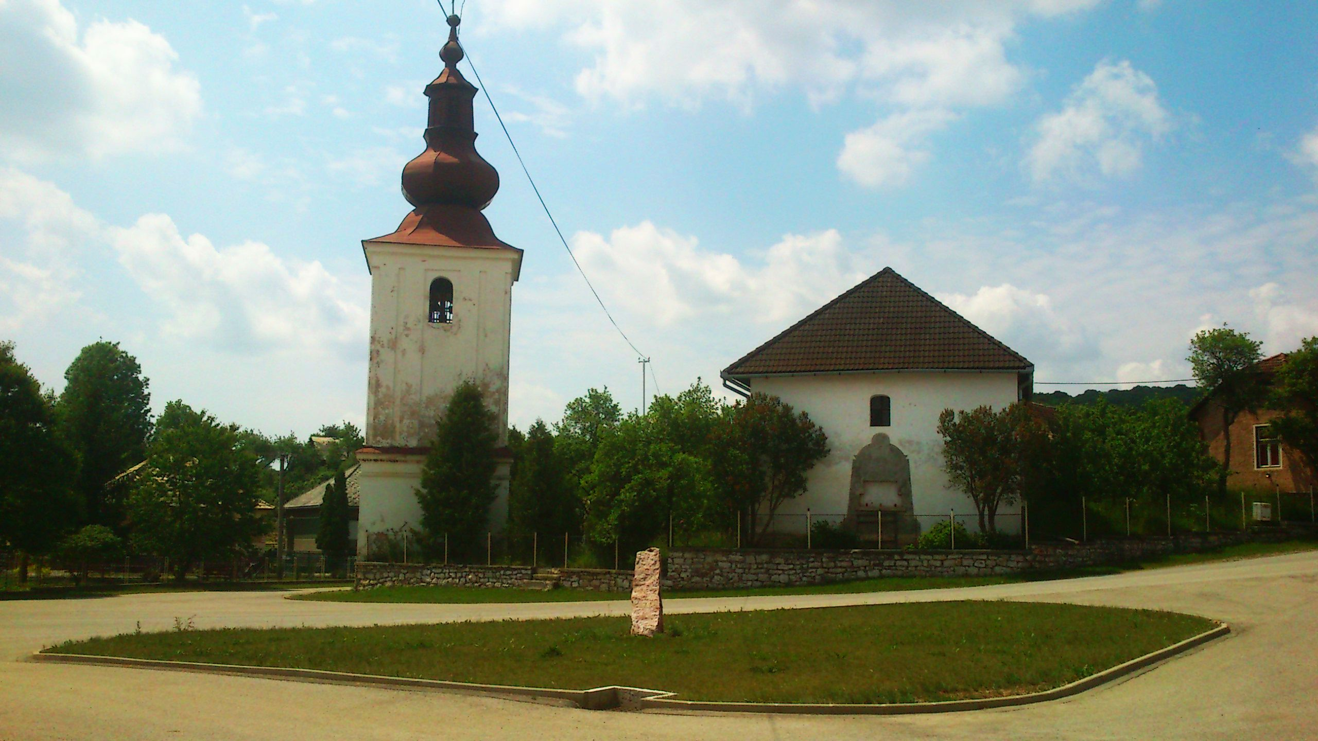 Silická Brezová